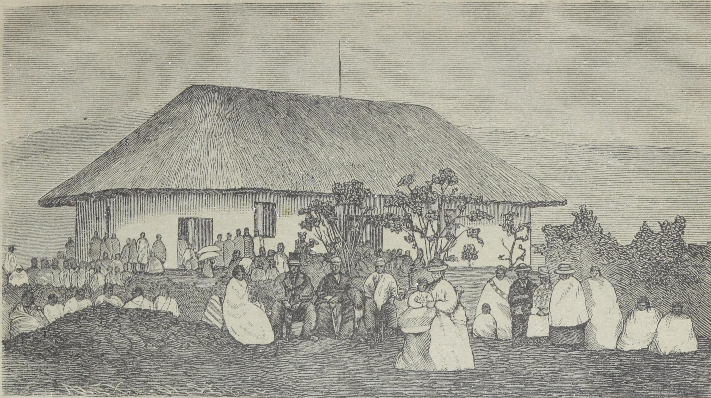 Illustrasjon hentet fra boken "En kortfattet Oversigt over Madagascar, dets Folk og Mission" av Borchgrevink, Chr. og utgitt av Det Norske Missionsselskabs Forlag (Kristiania, 1885)